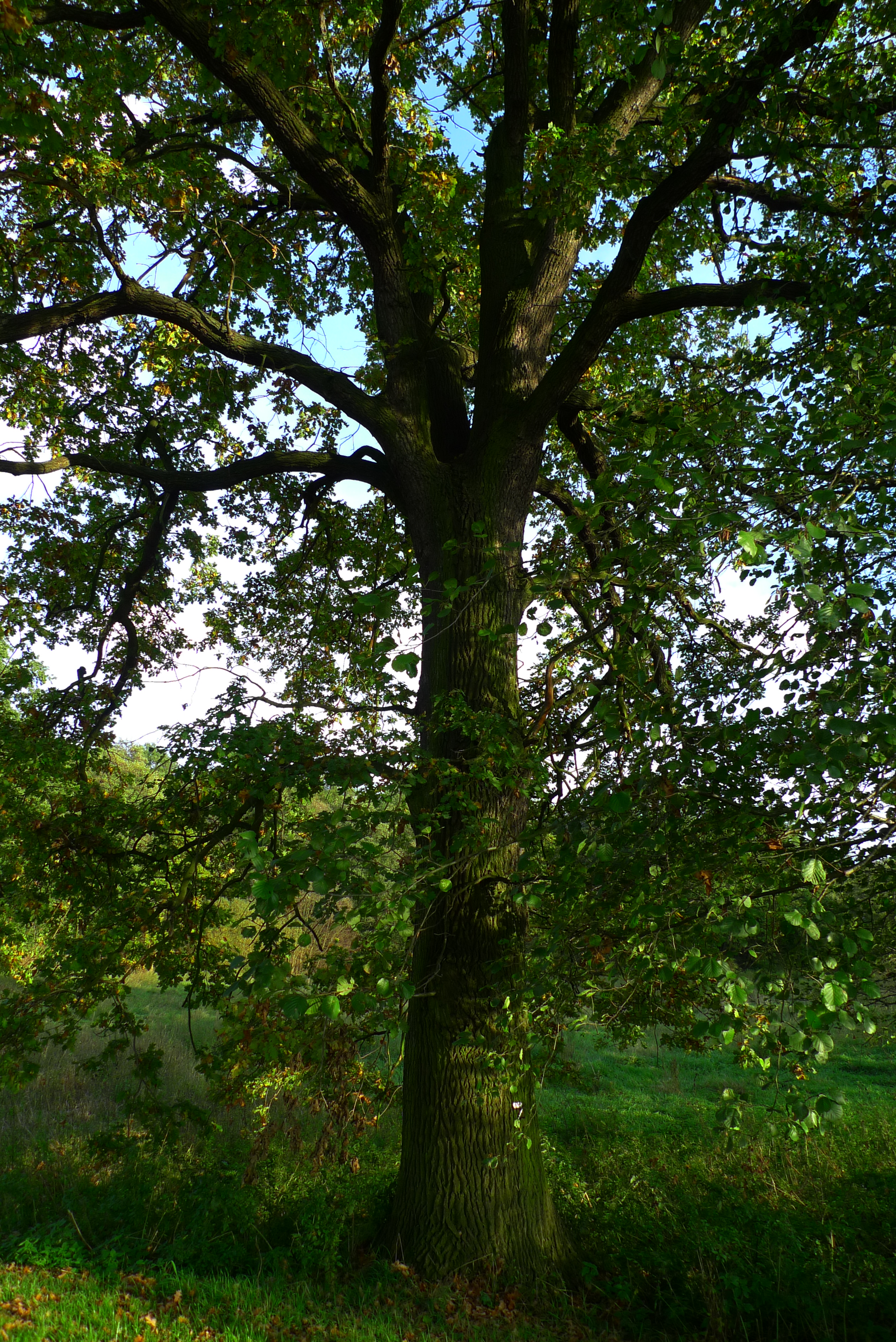 památný strom u Dobré vody